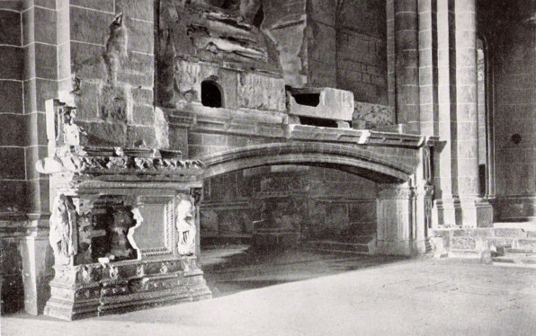 Panteons de Poblet destruïts